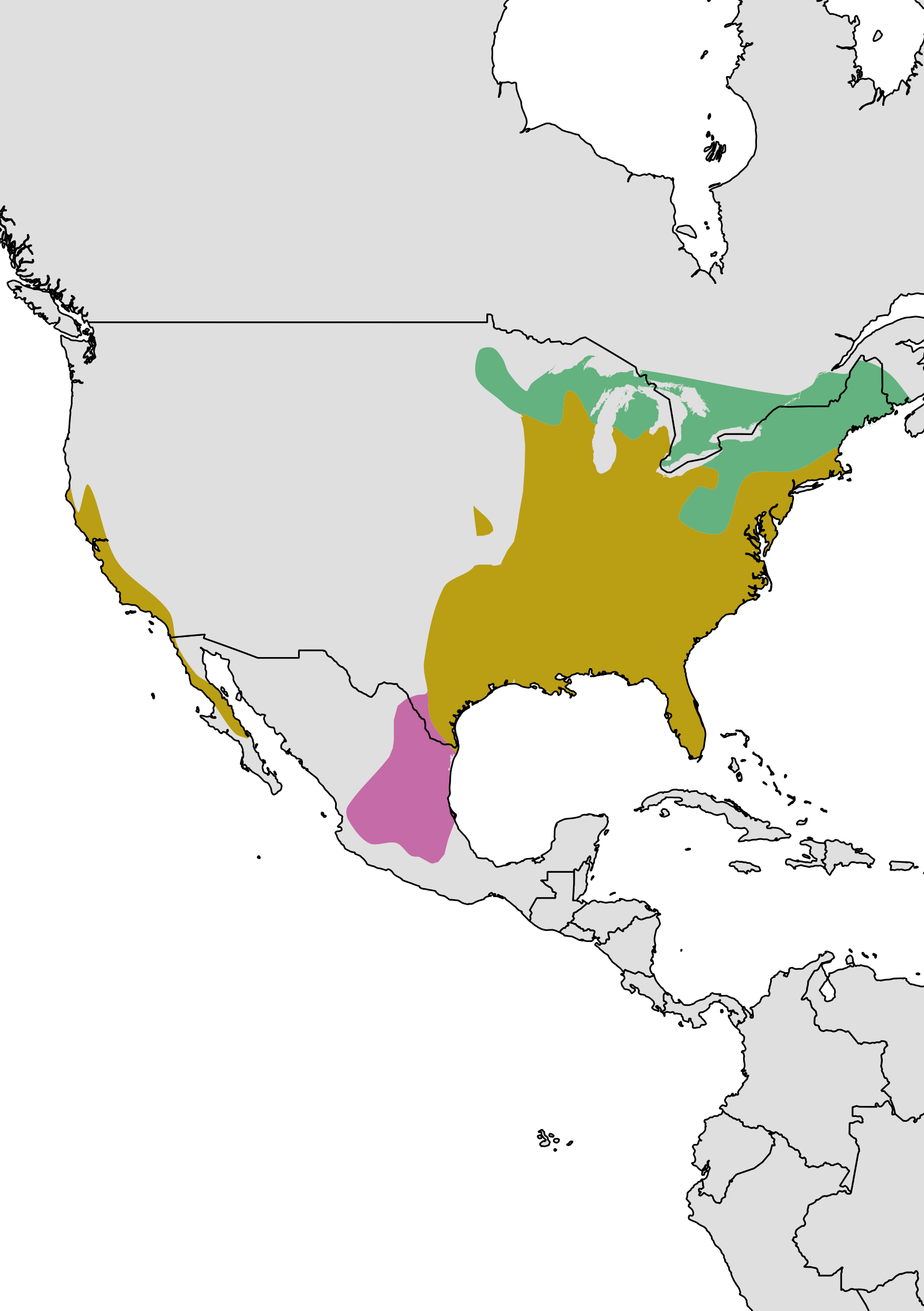 Distribución de Buteo lineatus